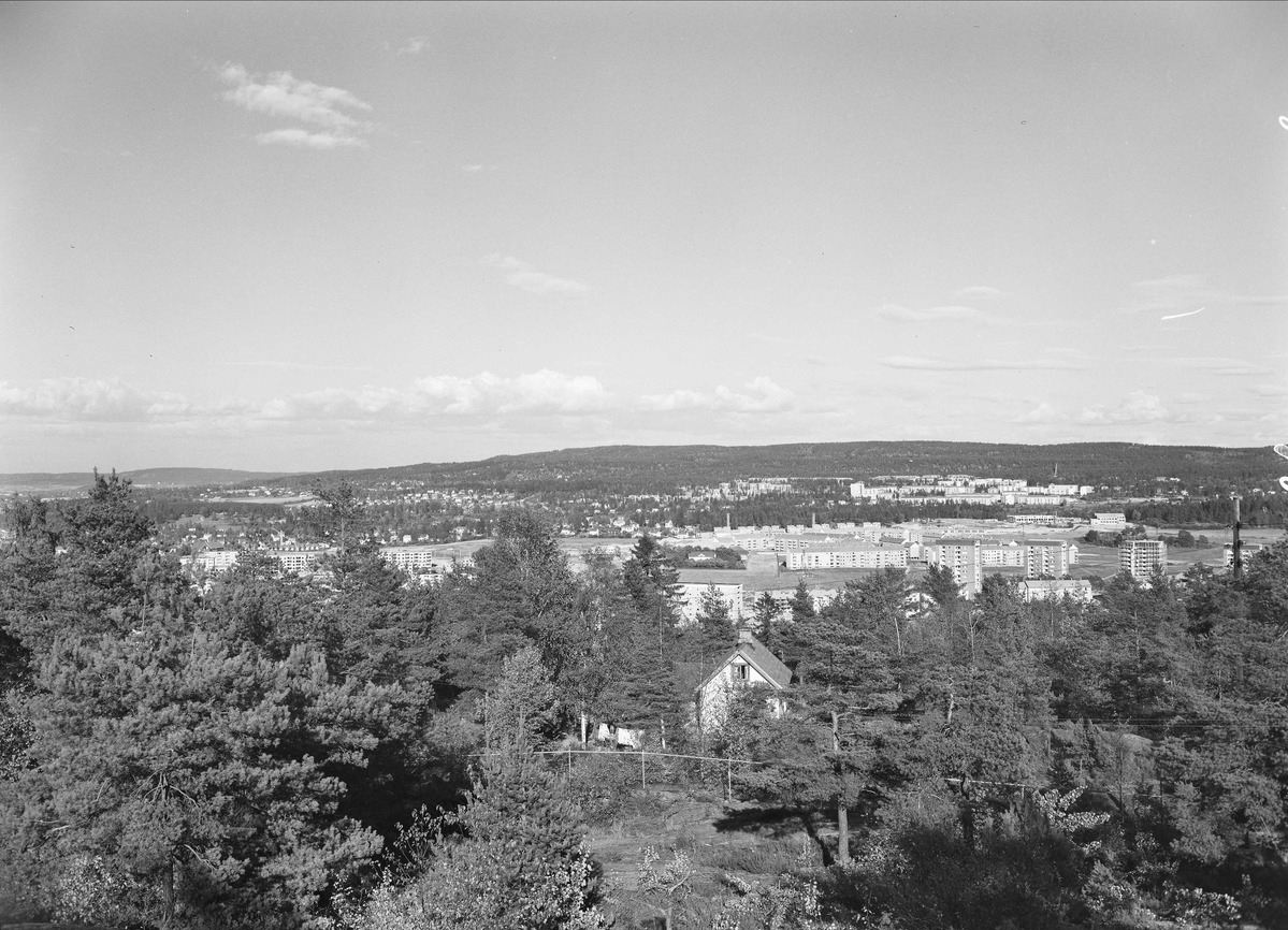 Utsikt fra Ryen varde mot øst over Manglerud. I bakgrunnen Oppsal og Østmarka